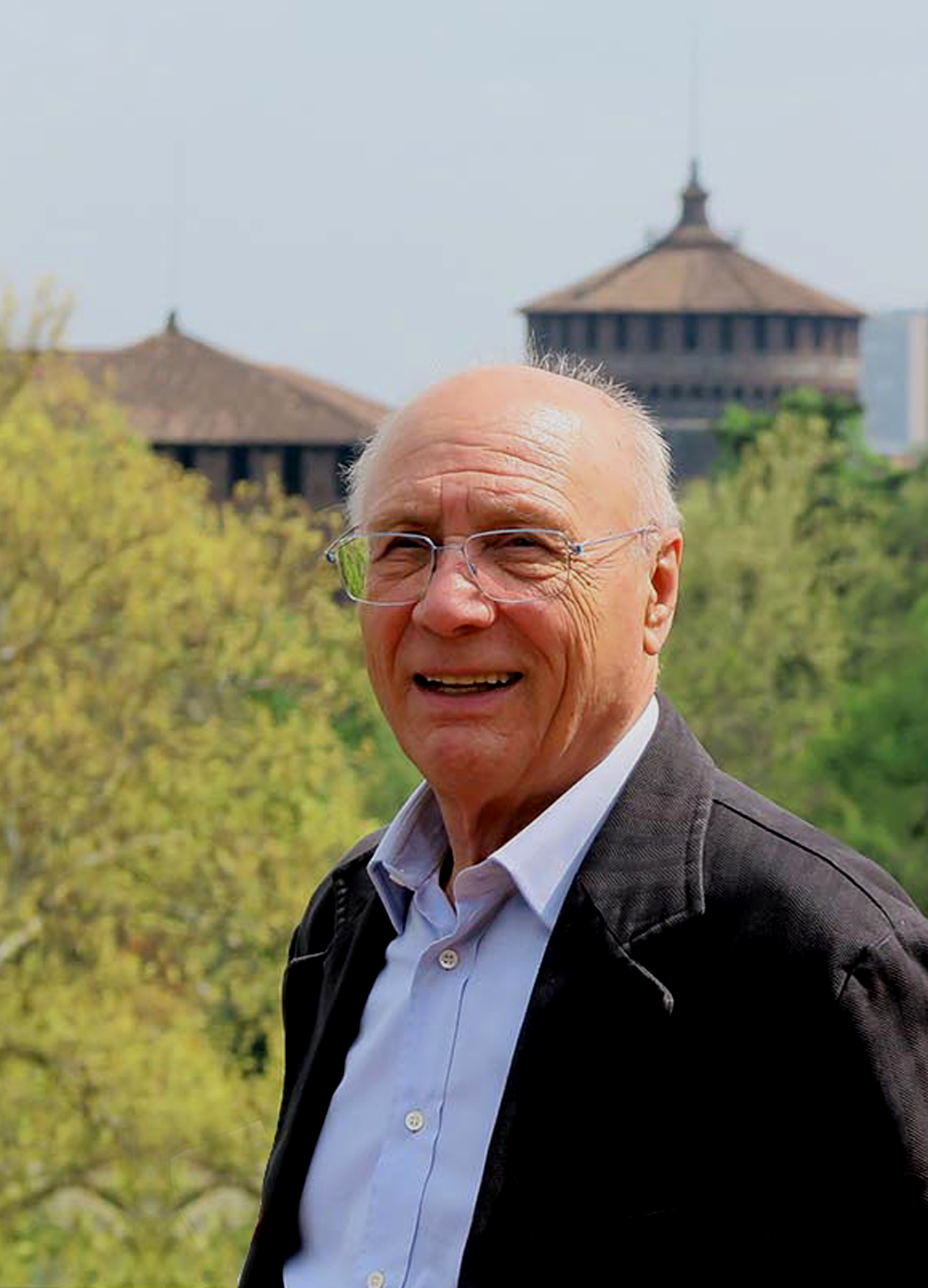 Piero Castiglioni